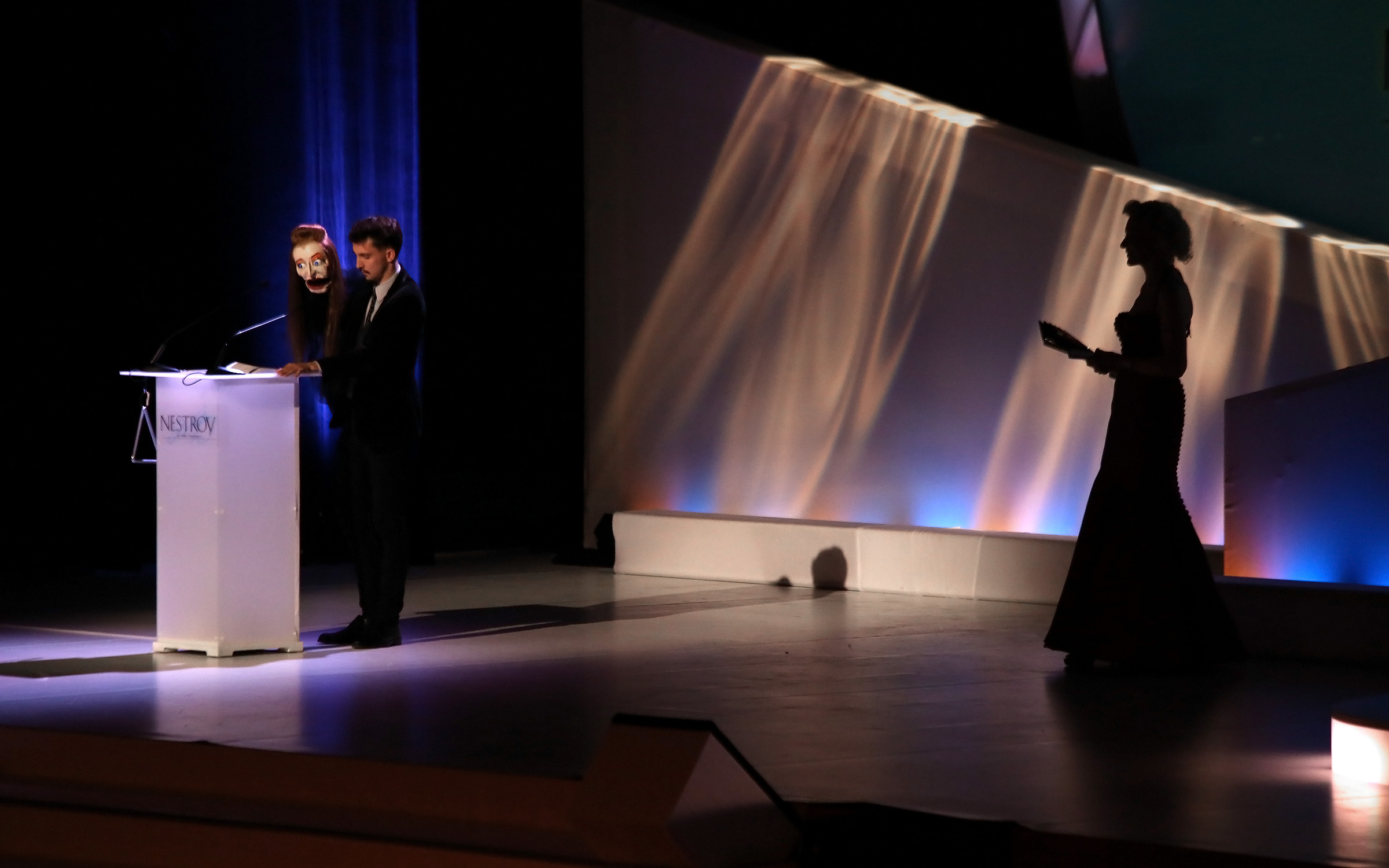 Elfriede Jelineks Rede als Preisträgerin (Bestes Stück – Autorenpreis), zuvor aufgezeichnet, wird von Nikolaus Habjan mit der Elfriede-Jelinek-Handpuppe aus „Schatten (Eurydike sagt)“ vorgetragen, rechts Moderatorin Sunnyi|Melles - Nestroy-Theaterpreis 2013 in der Halle F der Wiener Stadthalle (Wien, Österreich).